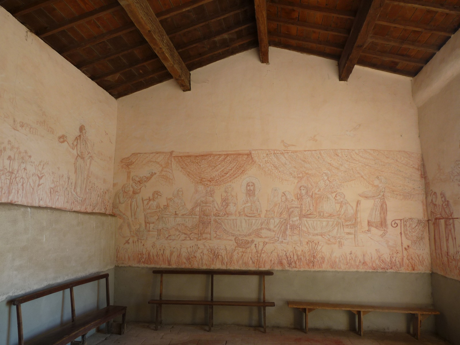 Entrée de la chapelle de Ste-Apollonie, Aurin, Haute-Garonne, France